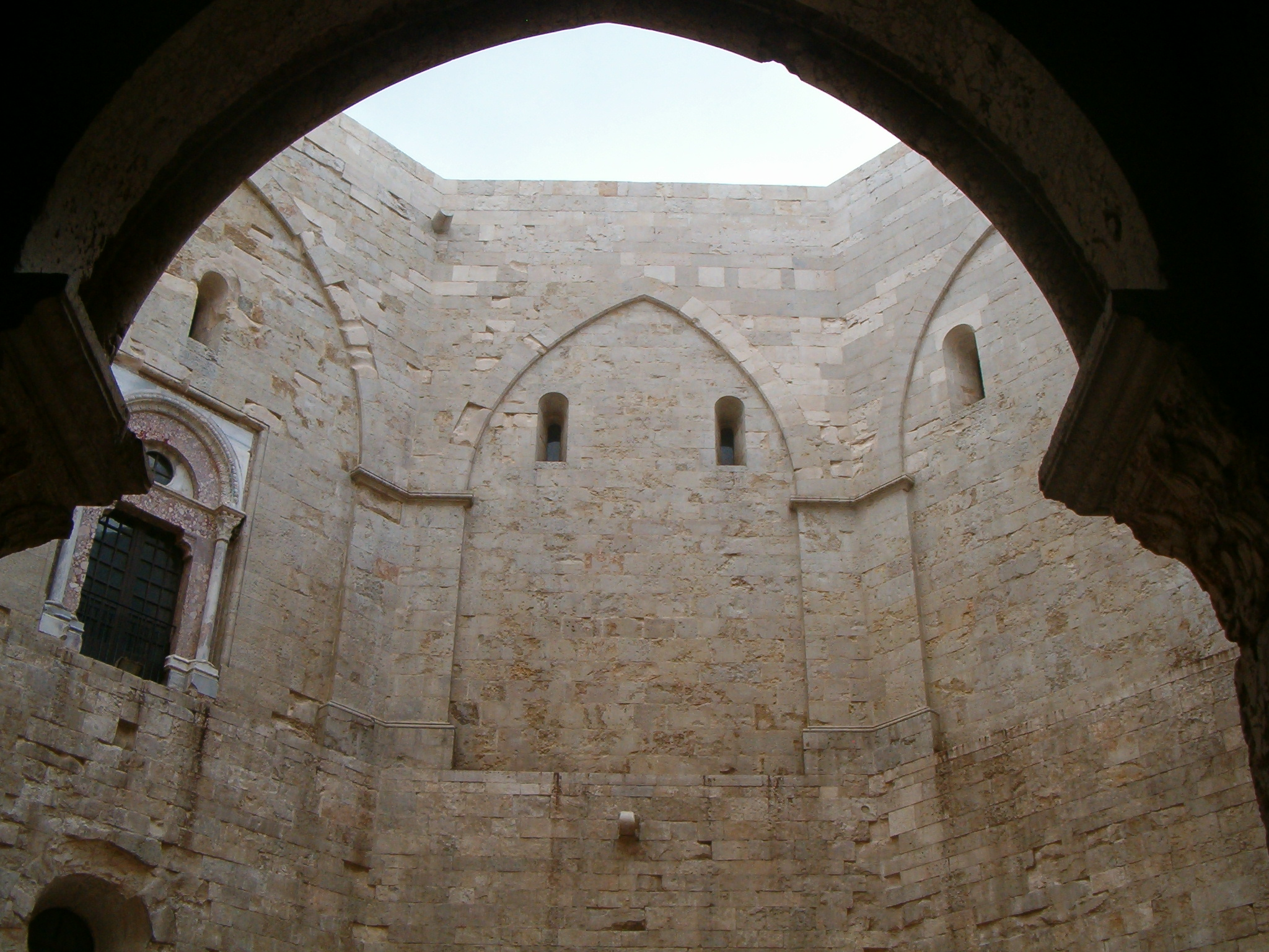 Castel del Monte (Puglia, Italy), 1240 circa Castel del Monte (Puglia, Italy) - Cortile interno